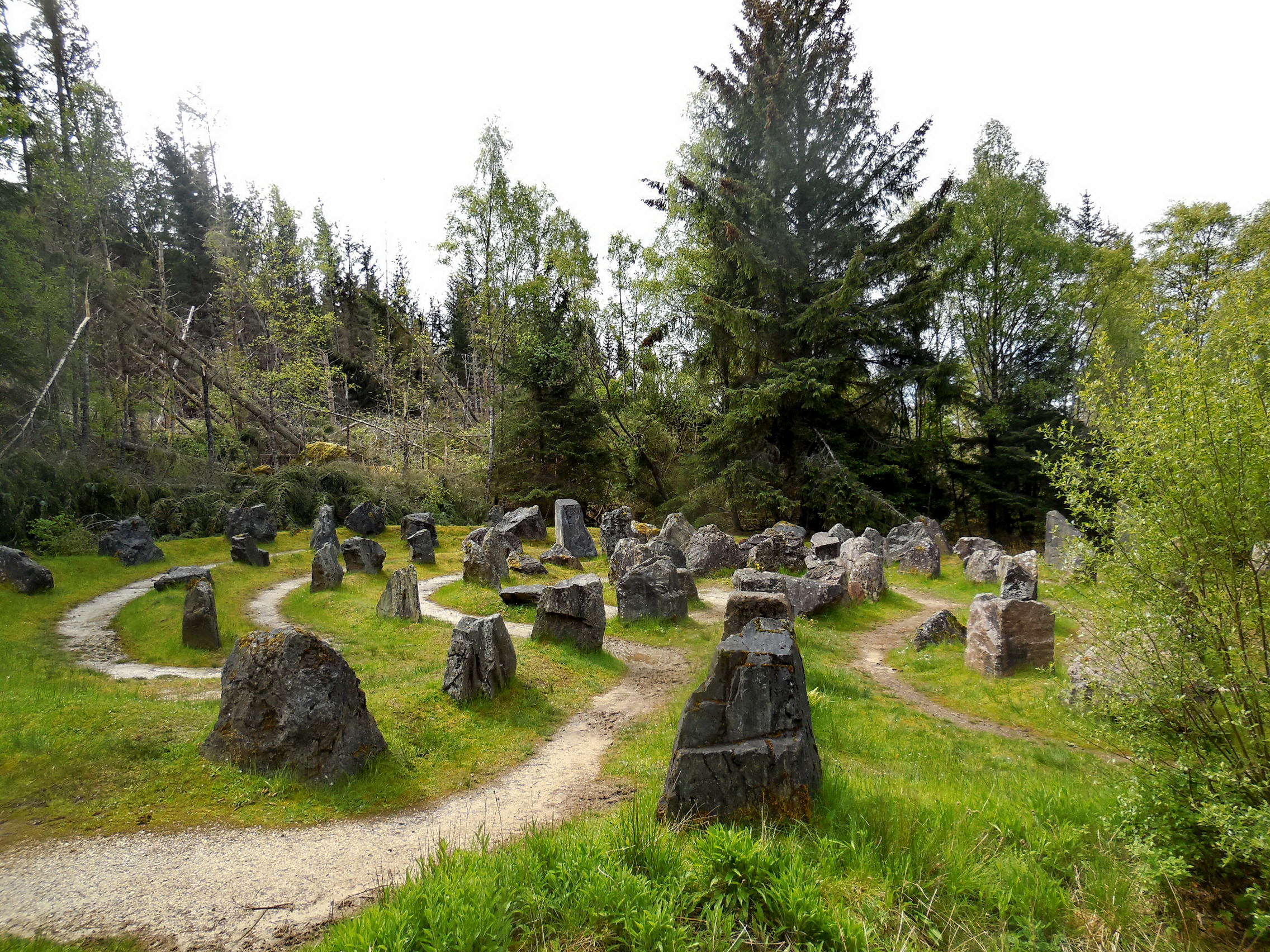 Touchstone Maze